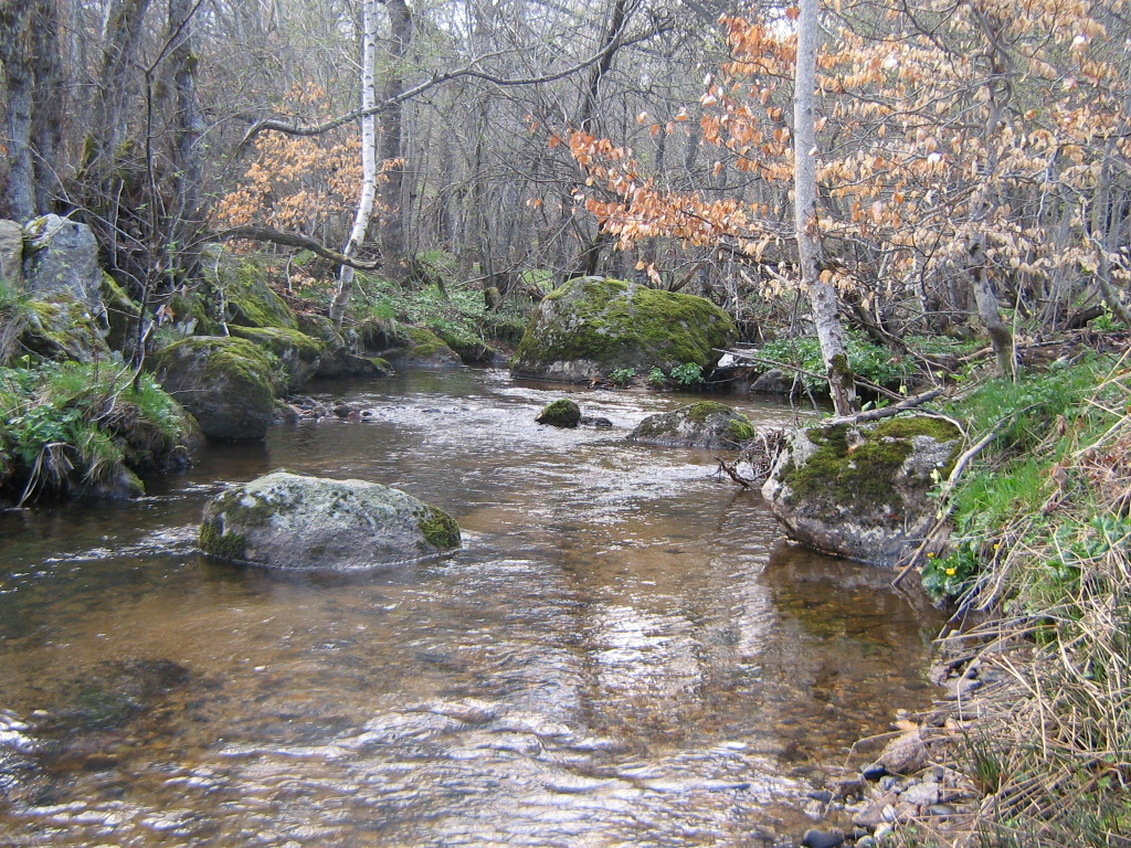 Le Piou aux alentours du Mas de Muret